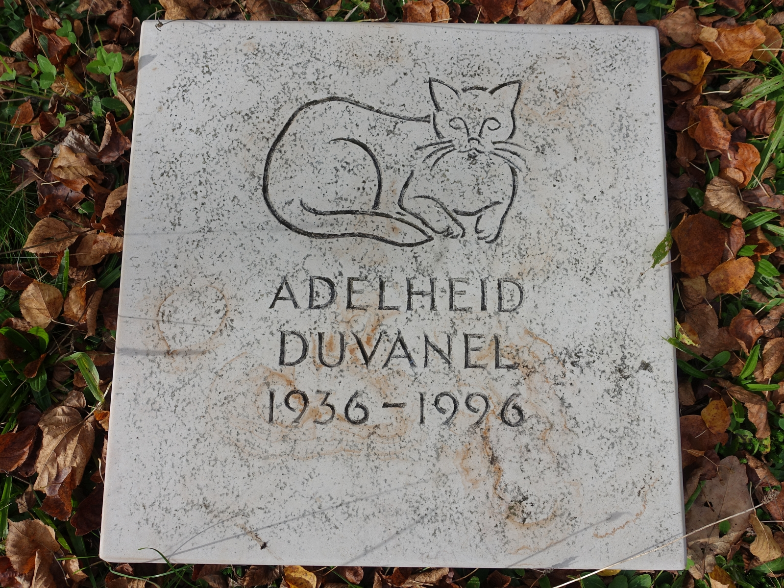 Adelheid Duvanel (1936-1996) Schriftstellerin und Malerin. Prominenten Grabfeld Friedhof am Hörnli mit Josef Edward Duvanel (1941-1986) Künstler